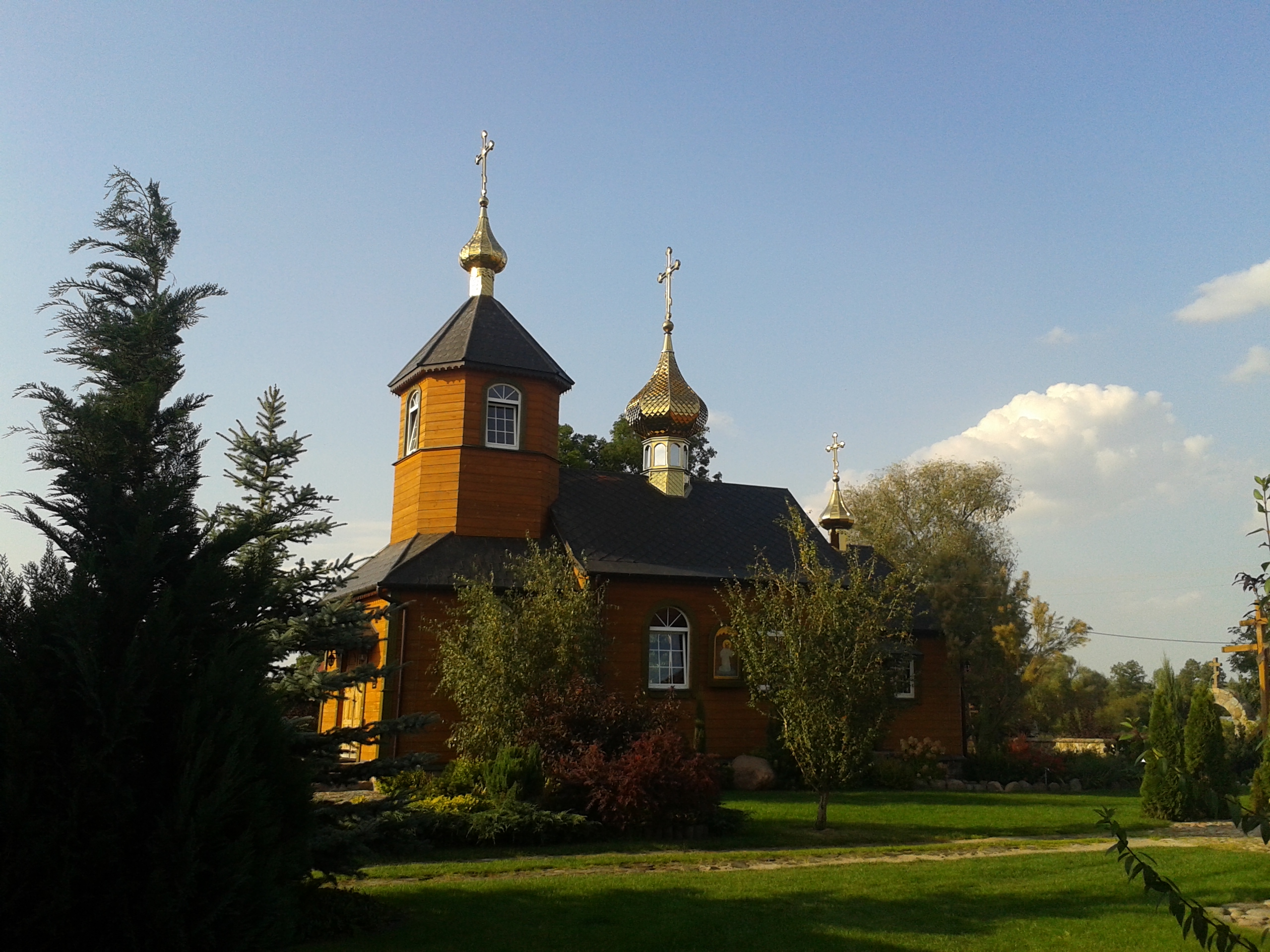 Prawosławna cerkiew monasterska w Kostomłotach